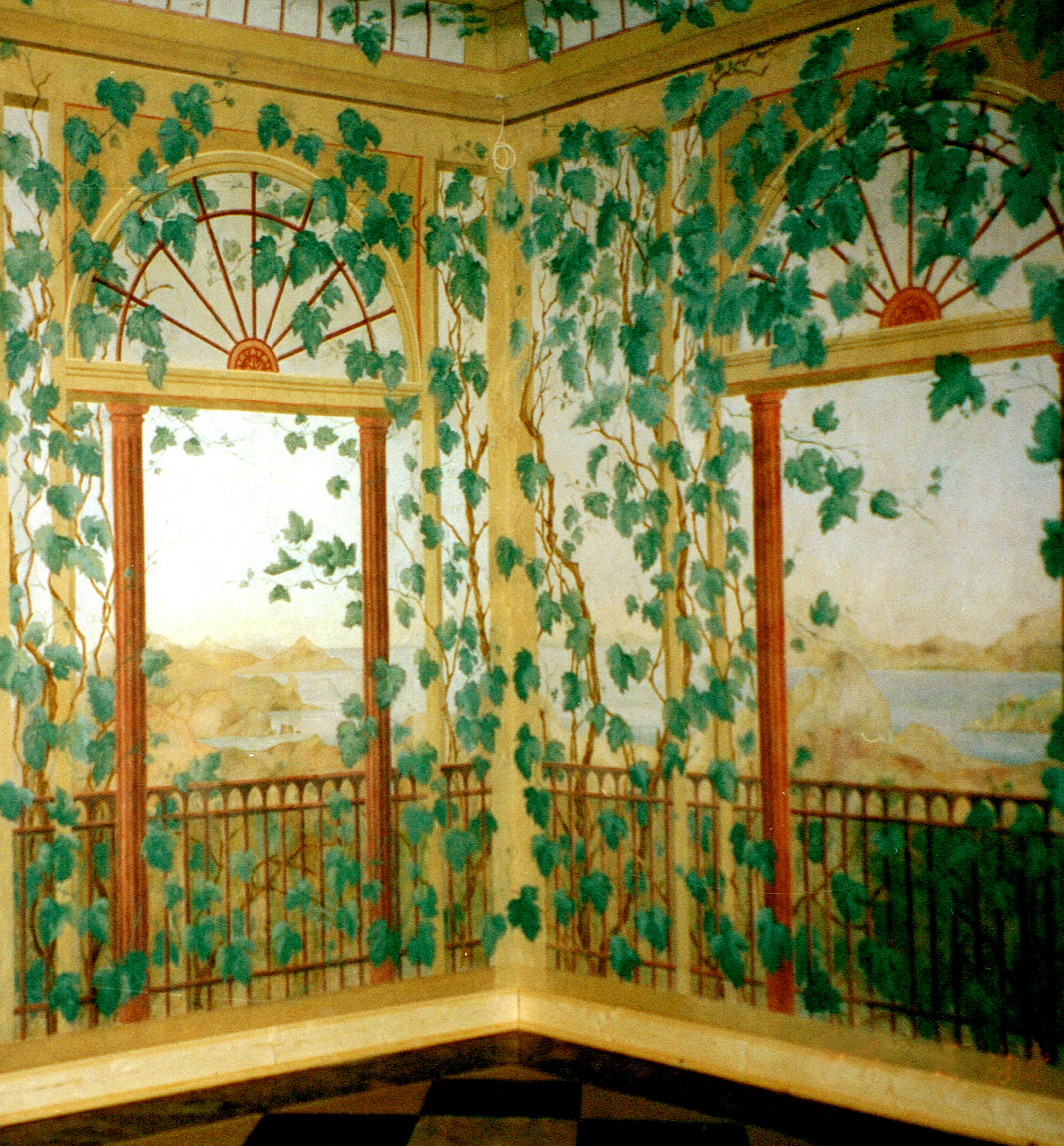 Widok sali ogrodowej po pracach restauracji polichromii, 2005 r.